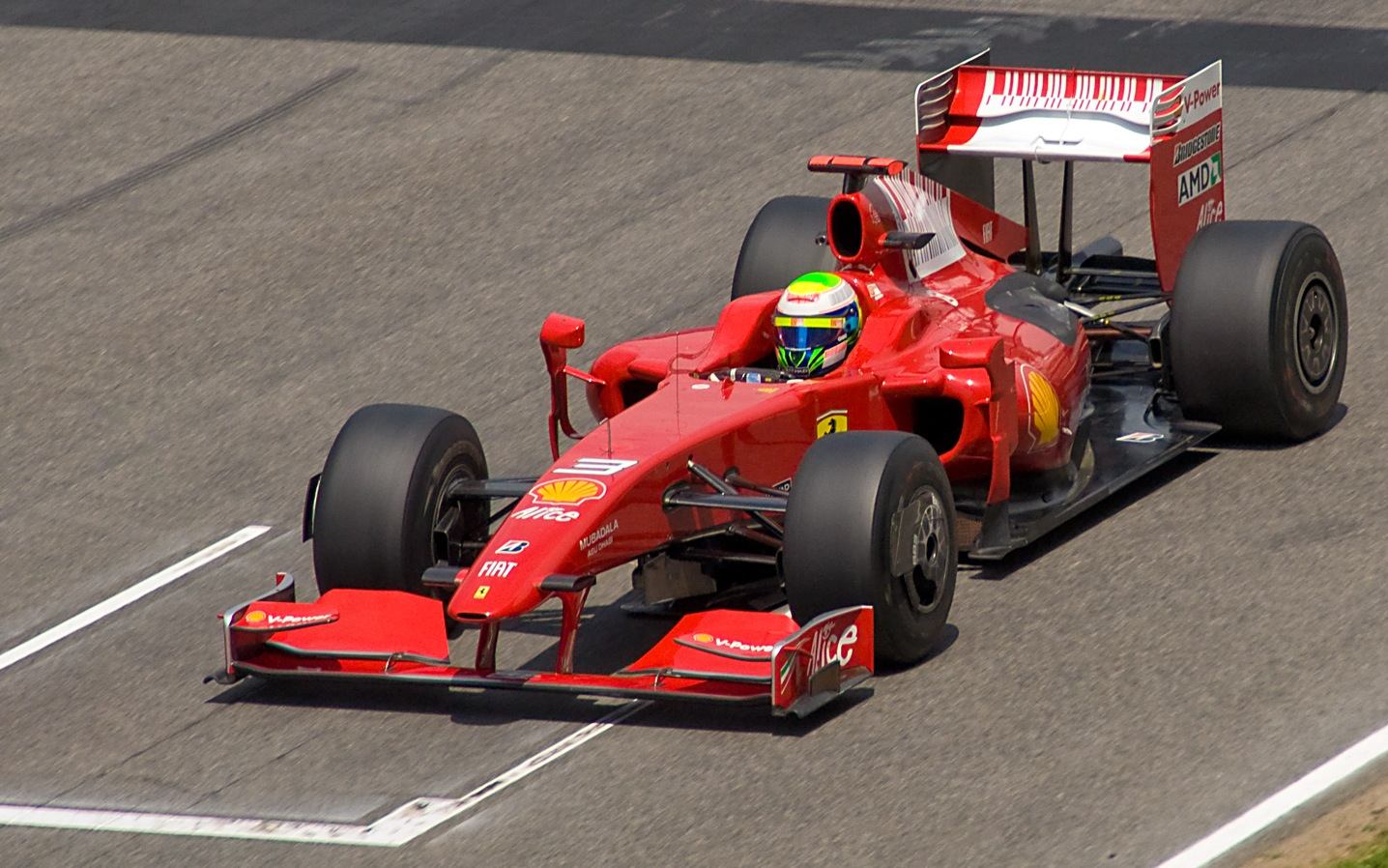 Nikon D90 + Sigma 18-200 DC OS HSM 1/2000s - F/9 - 200mm - ISO640